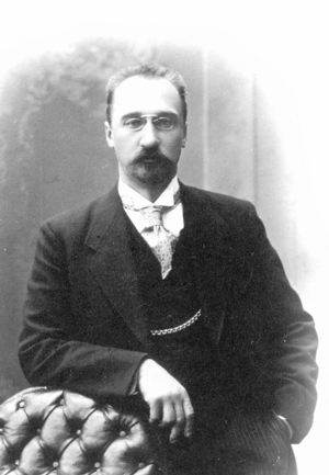 Сергей Хренников, директор Сормовских заводов, Ни́жний Но́вгород.